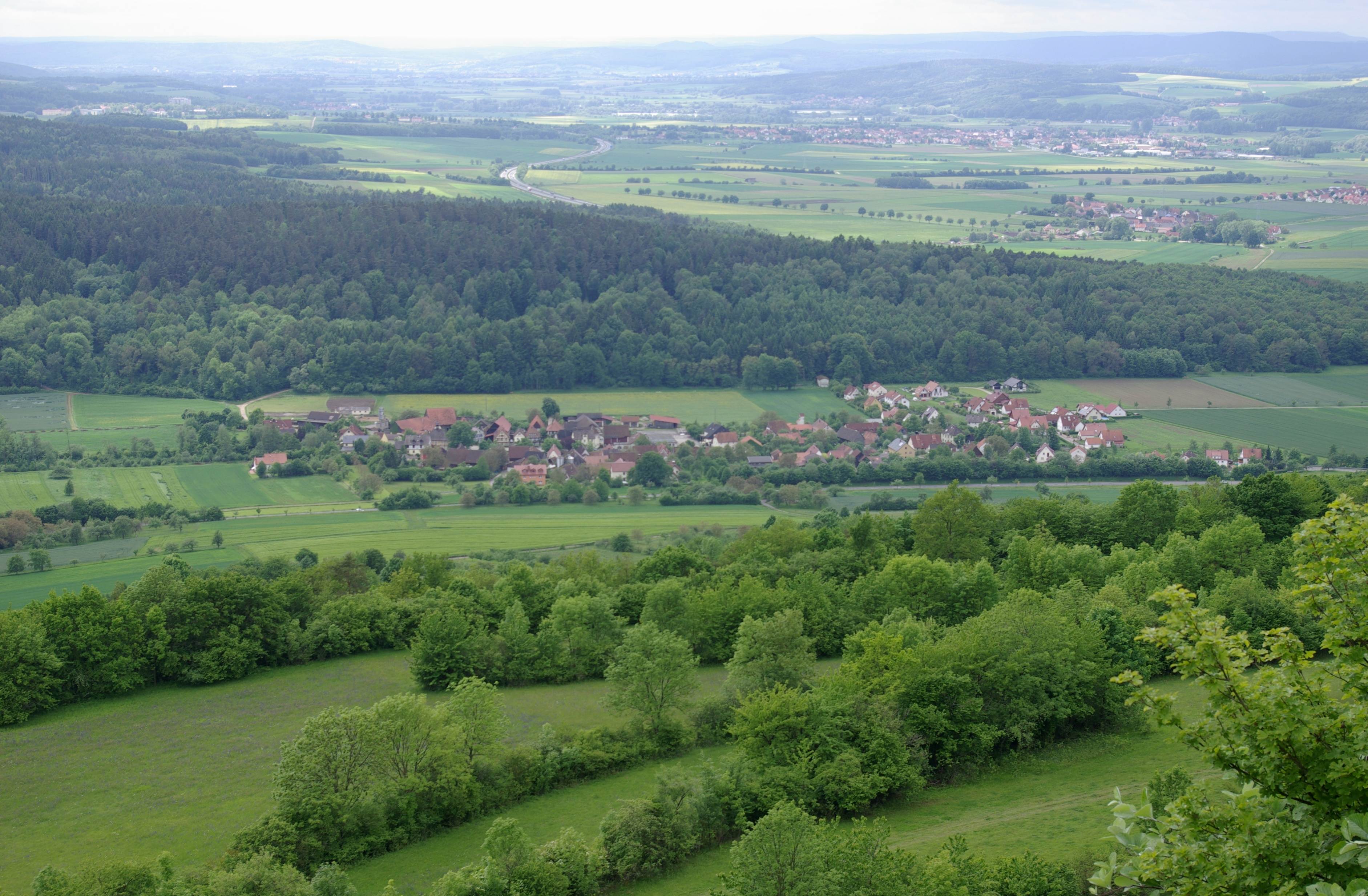 Blick vom Staffelberg auf den Bad Staffelsteiner Ortsteil Horsdorf